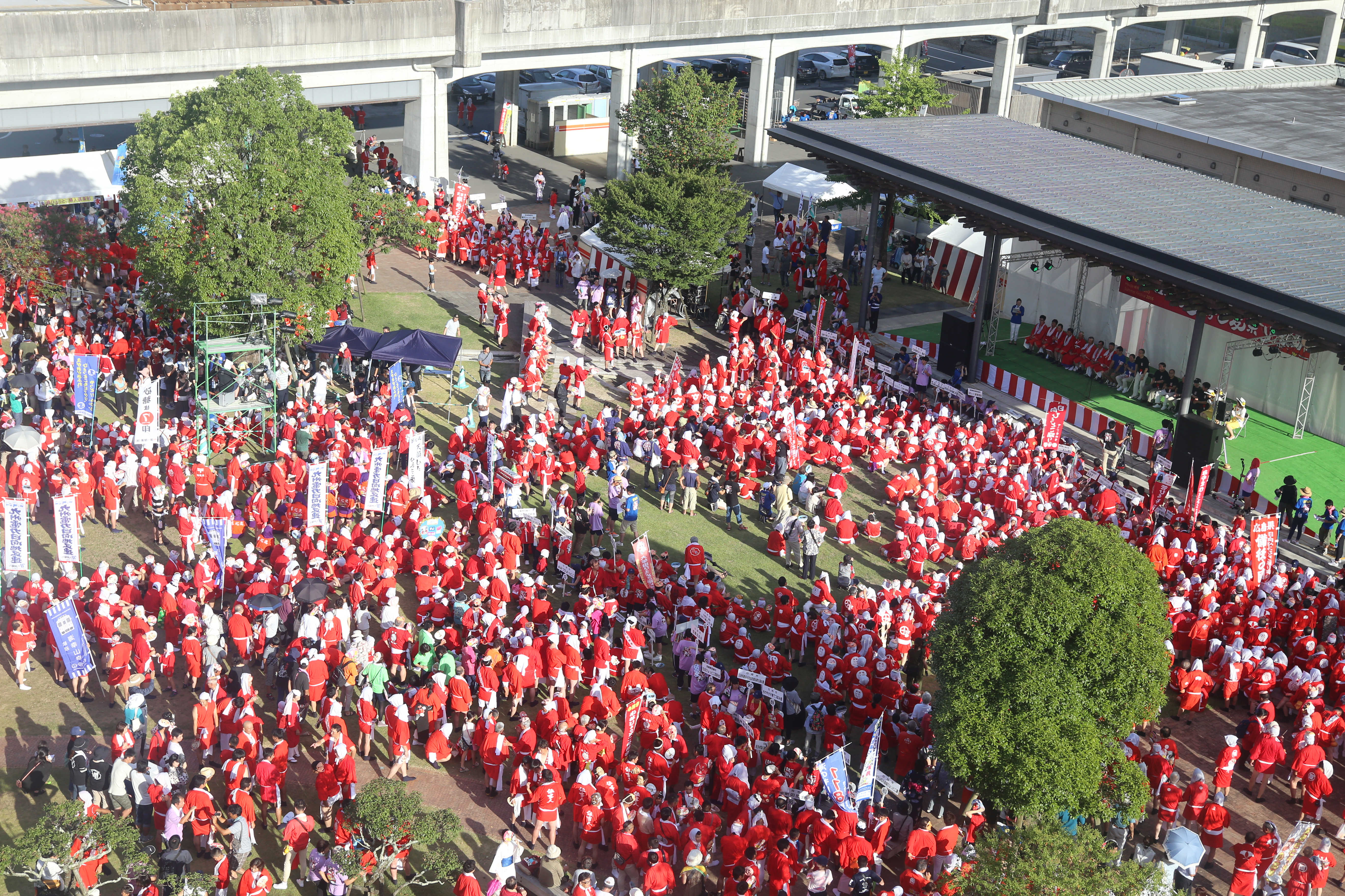 本祭り開会前の様子